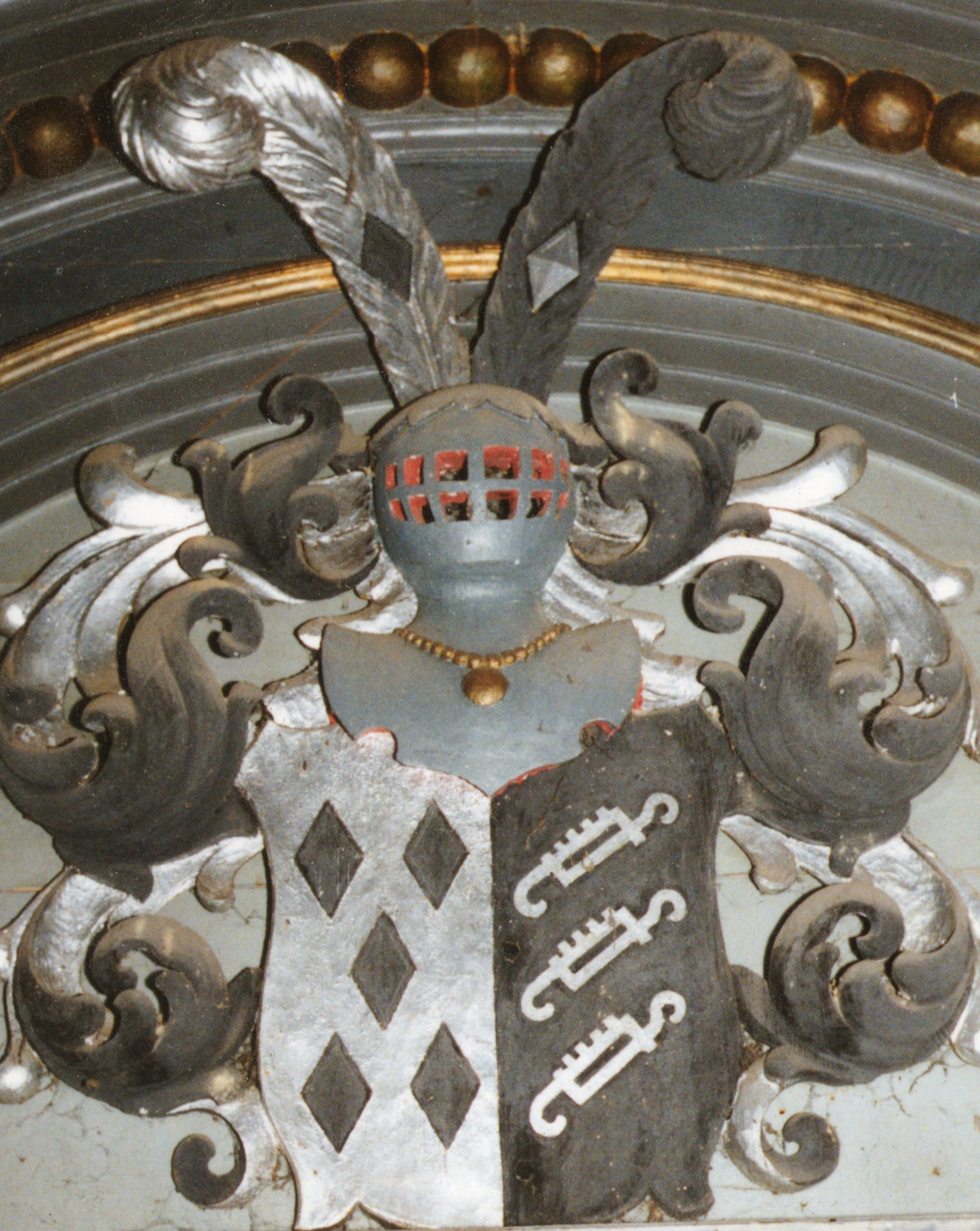 Foto: Aus Burg Klevenow Wappen